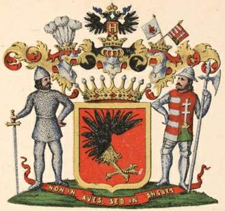 Bludovi suguvõsa krahvivapp